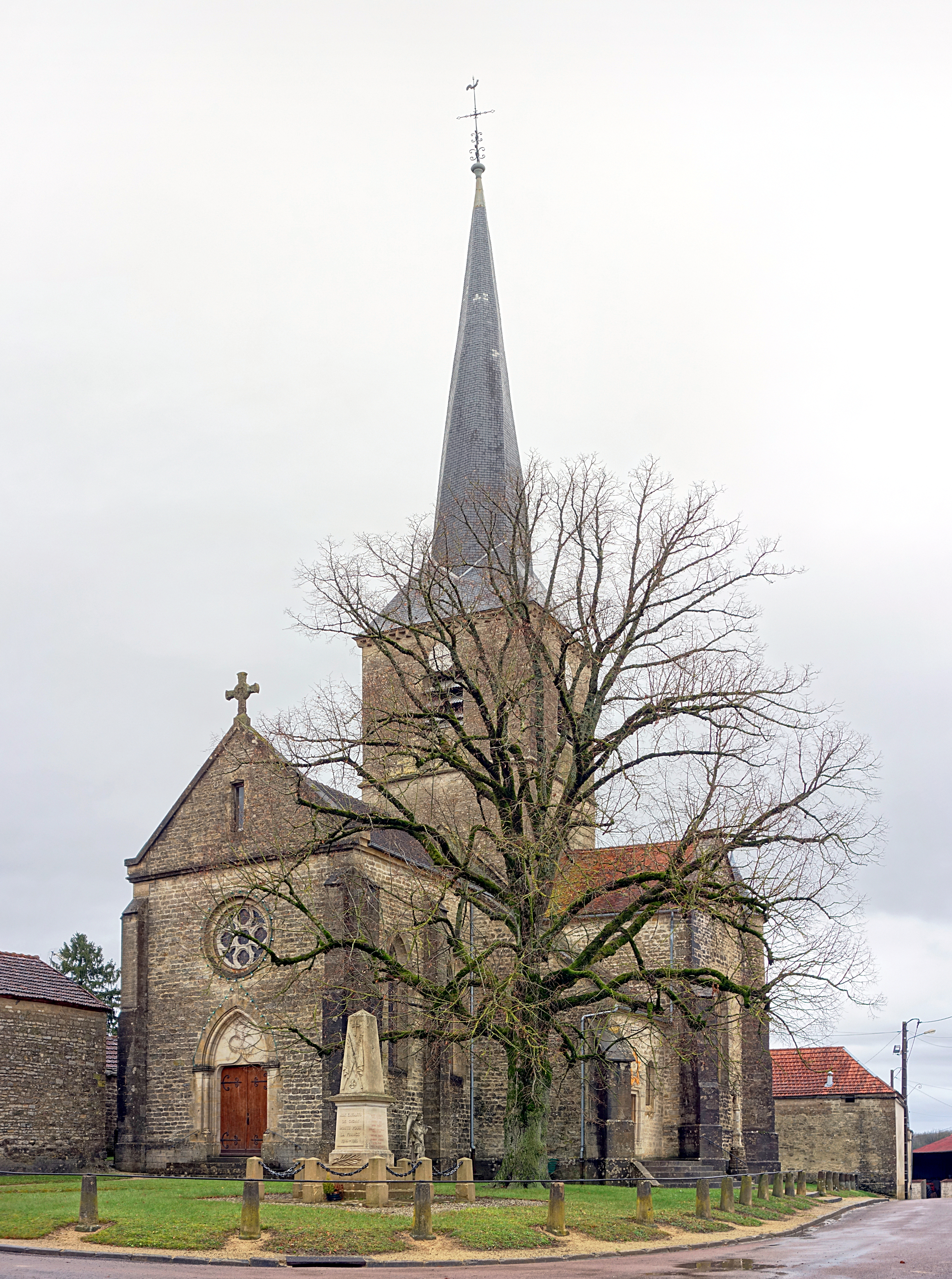 L'église Saint-Léger de Gigny (Yonne).